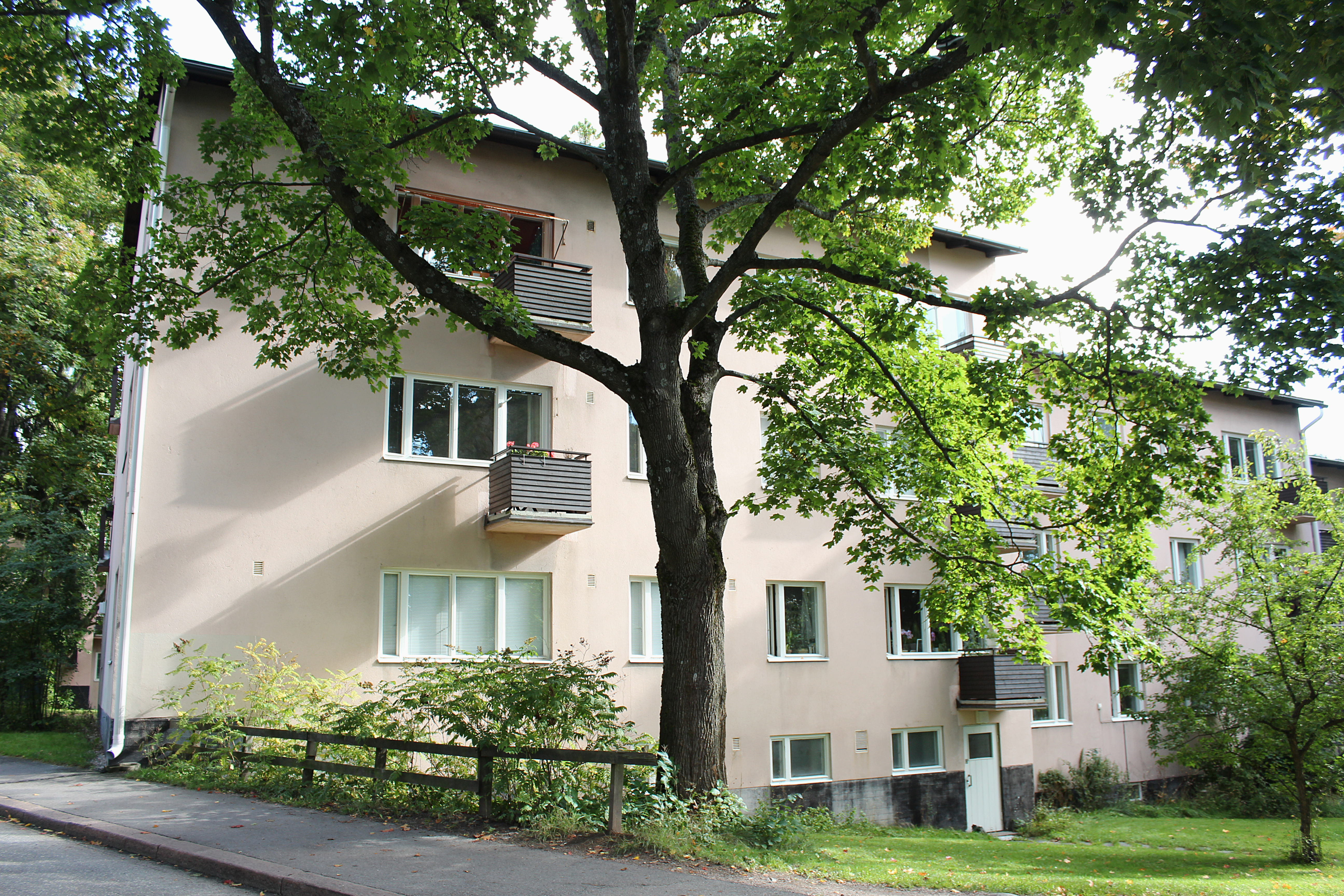 Olympiakylään kuuluva asuintalo Untamontiellä.